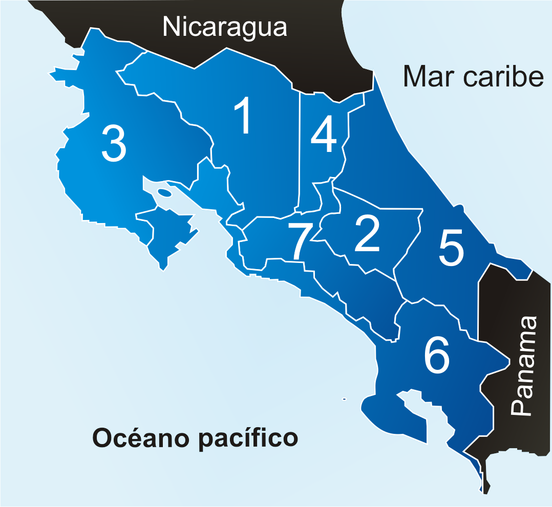 Mapa de Costa Rica vectorizado por Wa-Mx con licencia Creative Commons